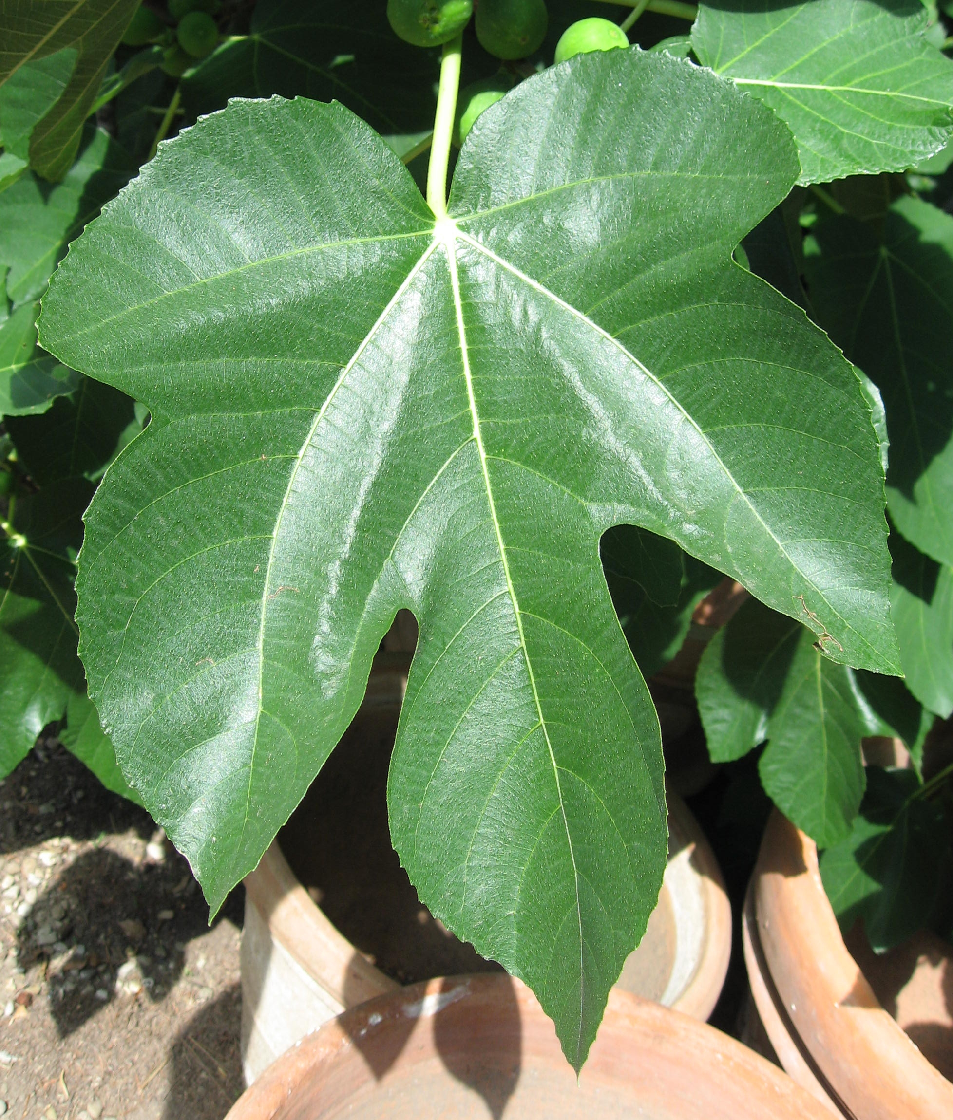 Ficus carica leaf in Giardino dei Semplici di Firenze Map: 43° 46' 45" N 11° 15' 39" E